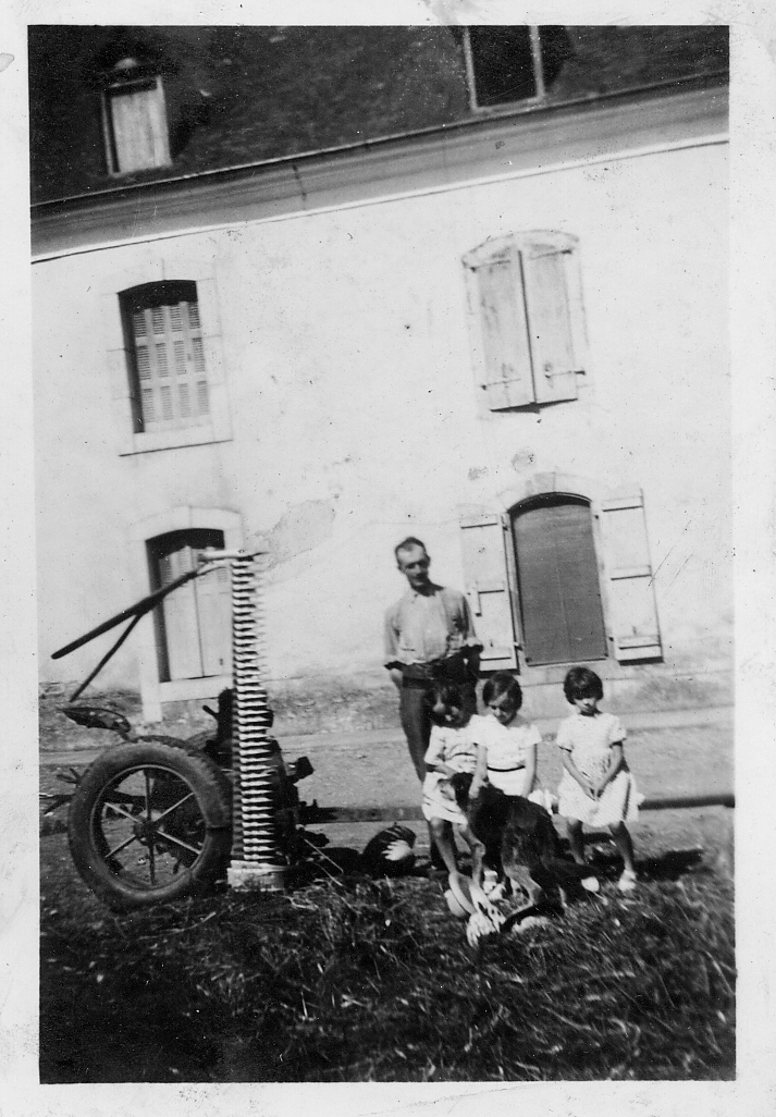 Photographie, dans la cour de Borië, en 1936, d'une faucheuse à barre de coupe actionnée par un moteur Bernard 1929, 5 cv, tractée par un attelage de vaches. Le moteur, partiellement caché par la barre de coupe, était monté temporairement sur la faucheuse et servait le reste de l'année à d'autres usages : actionner la scie circulaire pour le bois, le moulin pour les grains etc. Présents sur la photo : Jean Darré, Maryse Darré au centre et les cousines Cazaux d'Aureilhan.